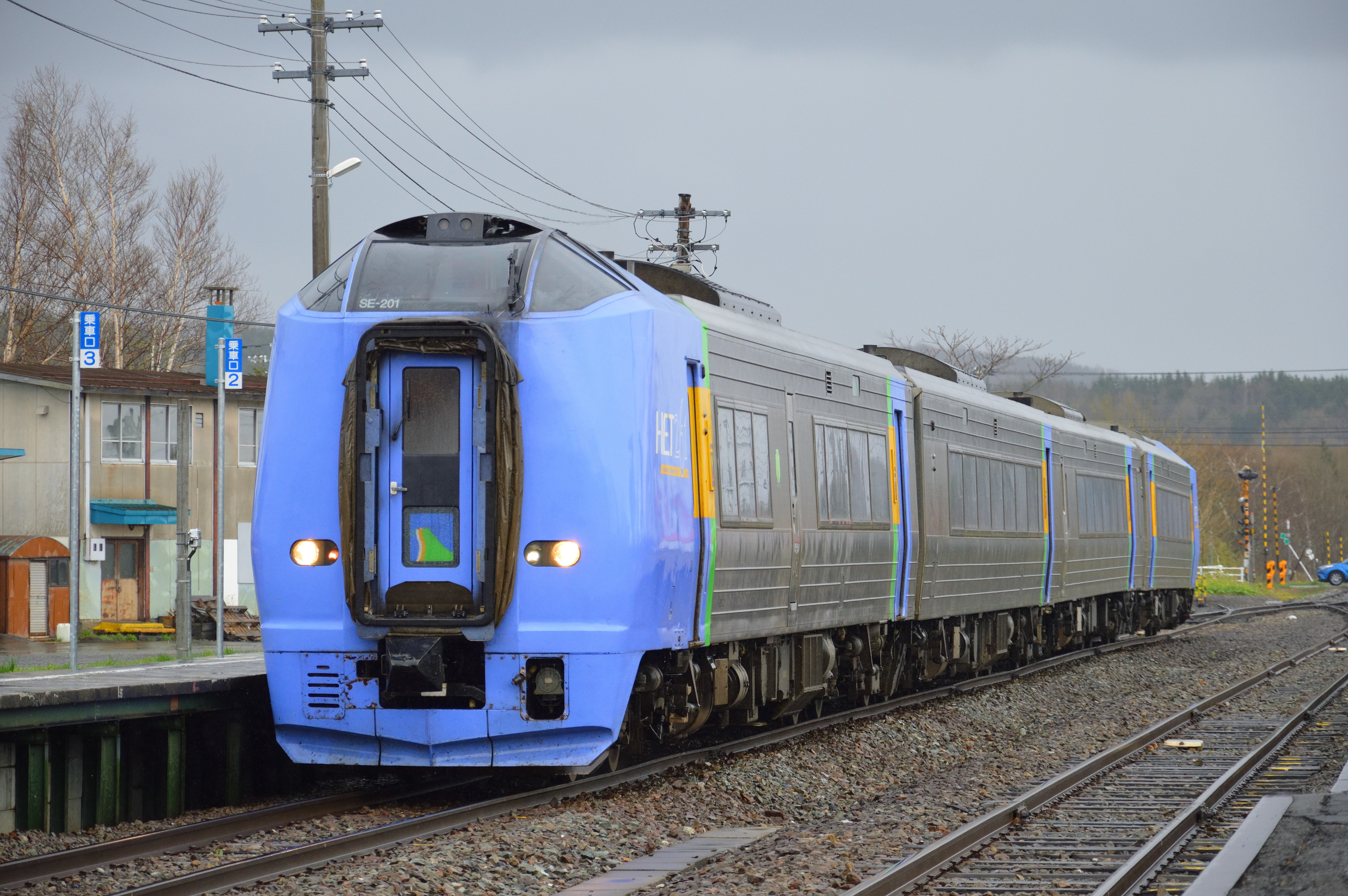 キハ261系基本番台（SE-201編成先頭）による宗谷本線特急列車、51D「宗谷」（2018年5月5日、幌延駅）